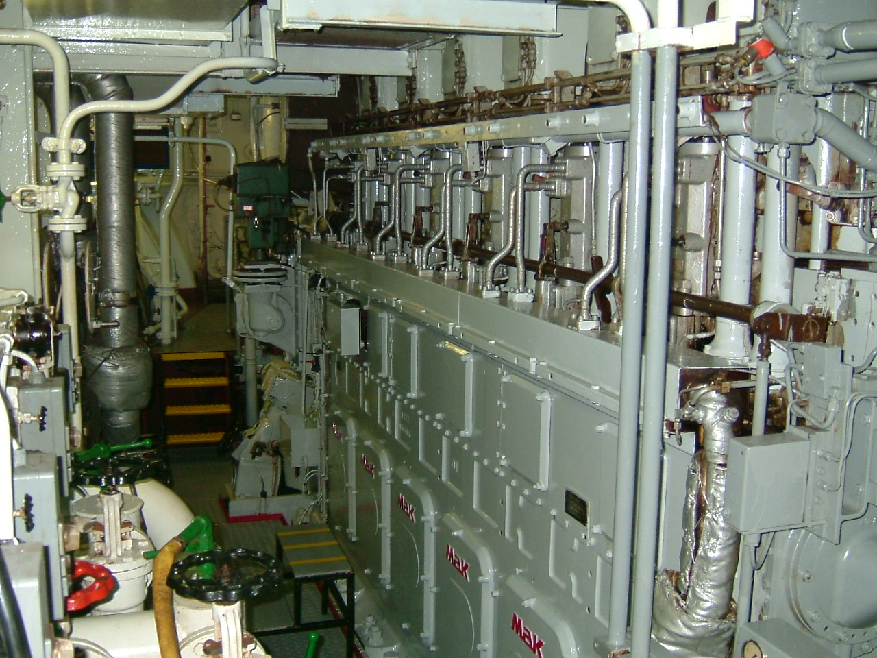 Moteur principal Main Engine